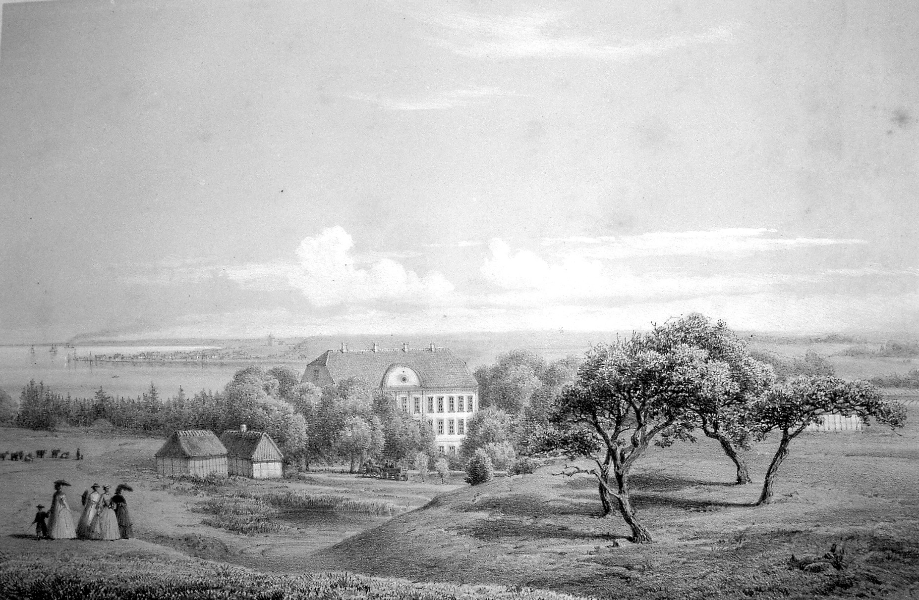 Lundbæk er en gammel hovedgård, som nævnes første gang i 1450. Gården ligger i Bislev Sogn, Hornum Herred, Aalborg Kommune. Hovedbygningen er opført i 1804. Lundbæk er nu en Landbrugsskole